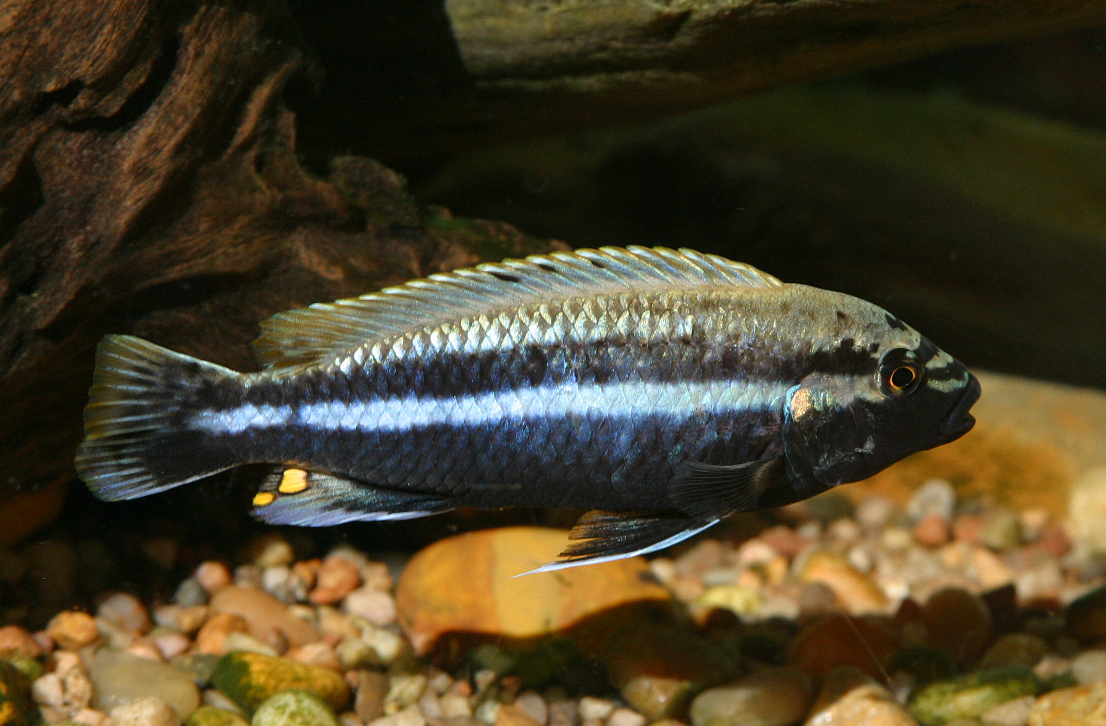 Melanochromis auratus (male)